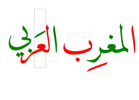 كتابة لإسم المغرب العربي بالخط العربي الأصيل